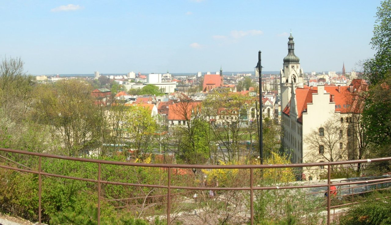 Aleja Górska w Bydgoszczy - widok na Stare Miasto